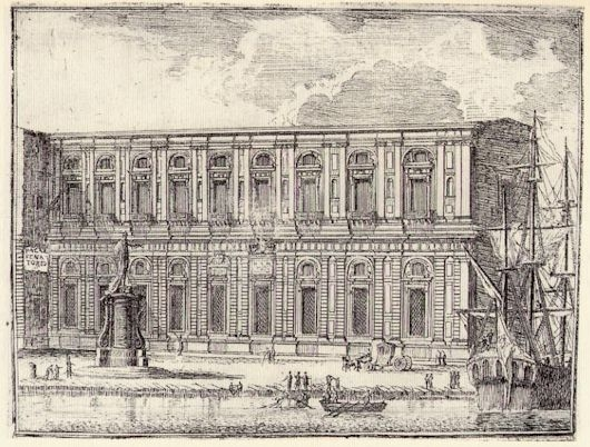 Francesco Sicuro, La Loggia dei Mercanti di Messina, progettata da Giacomo Del Duca, prima del terremoto del 1783.